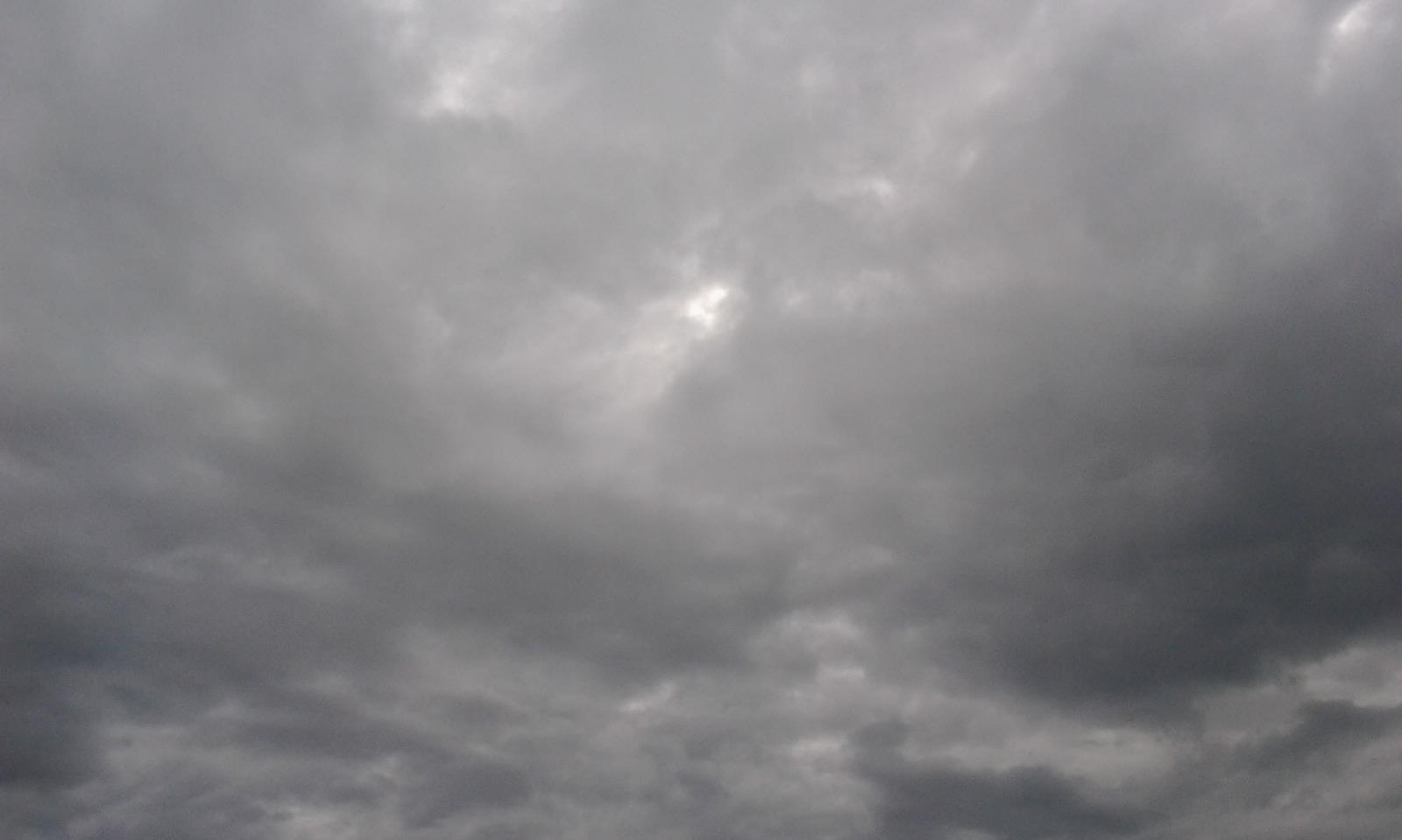 Foto tomada en las horas de la tarde. Cielo totalmente nublado, foto tomada en Bogotá, Colombia.